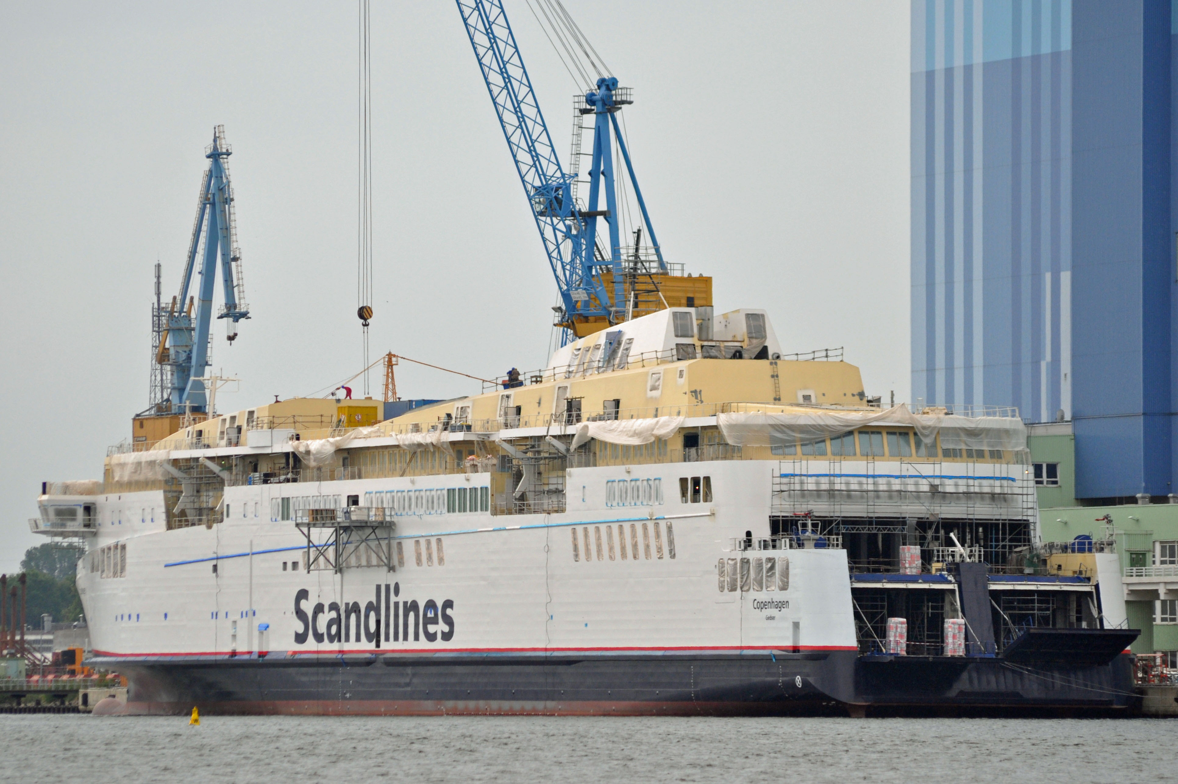 Schiffe vor der Volkswerft Stralsund.